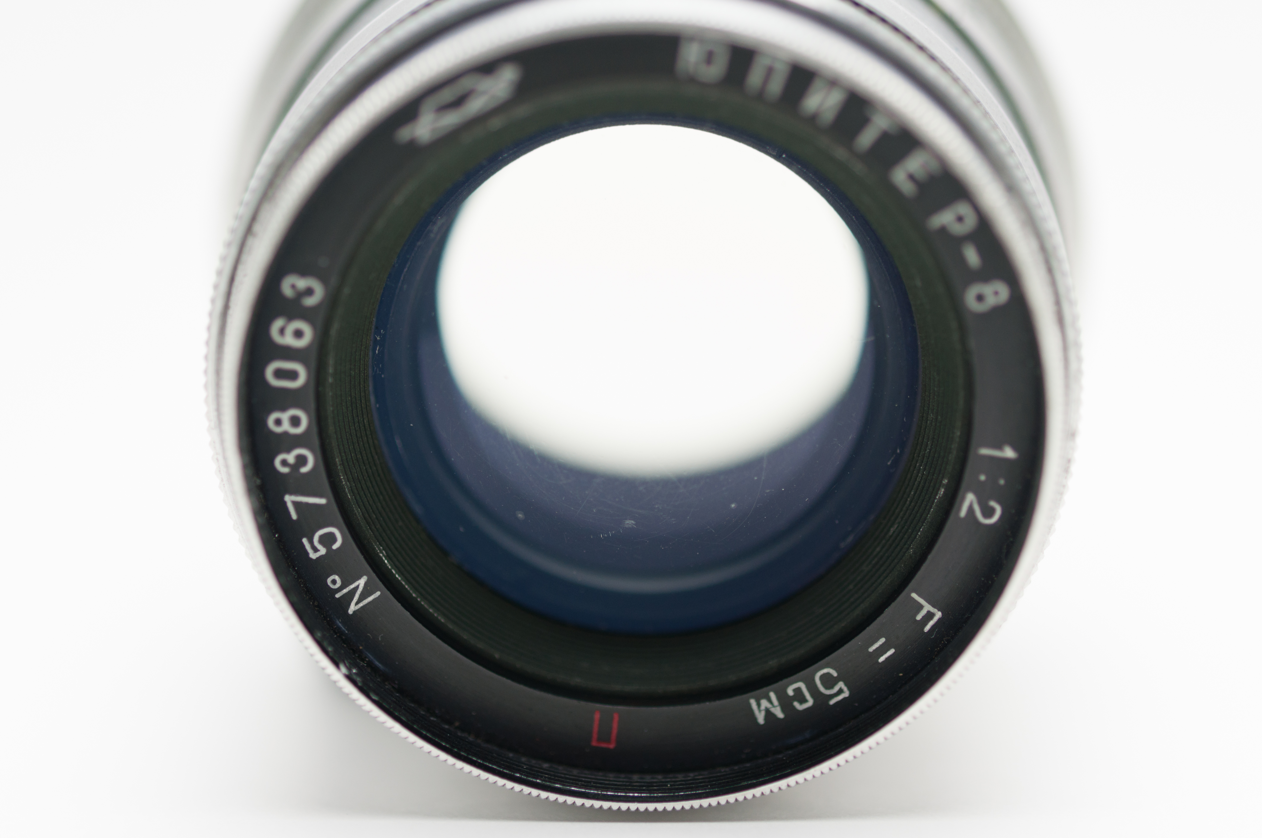 シリアルの頭2つが製造年のようです。これは1957年製ですね。